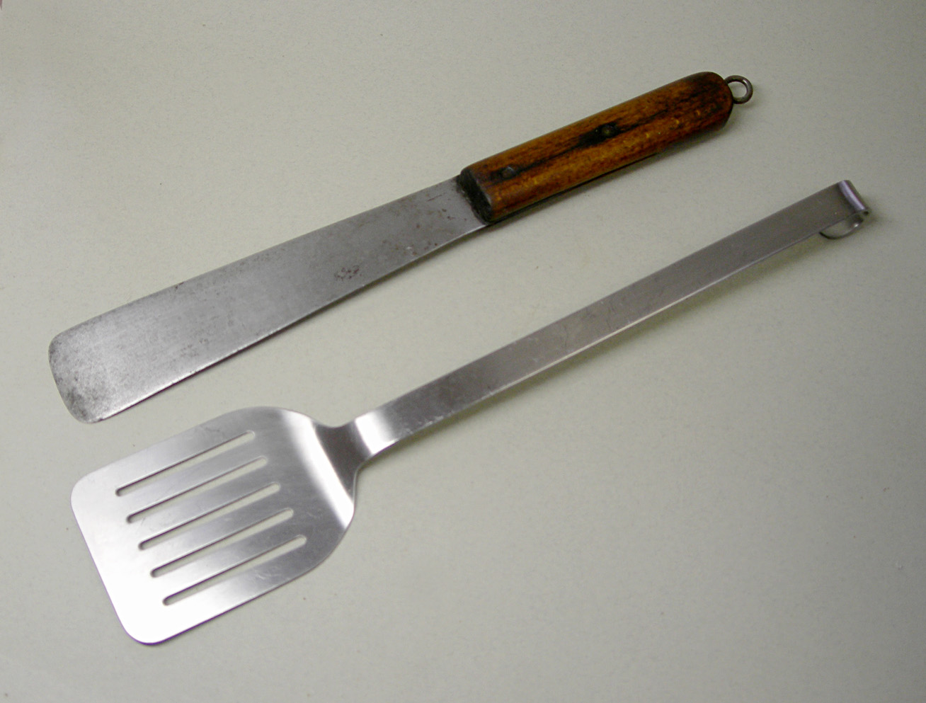 Verschiedene Pfannenwender